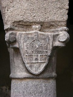 Stemma dei nobili Sessa scolpito su una colonna della Chiesa di S. Maria Assunta in Daverio (Varese).